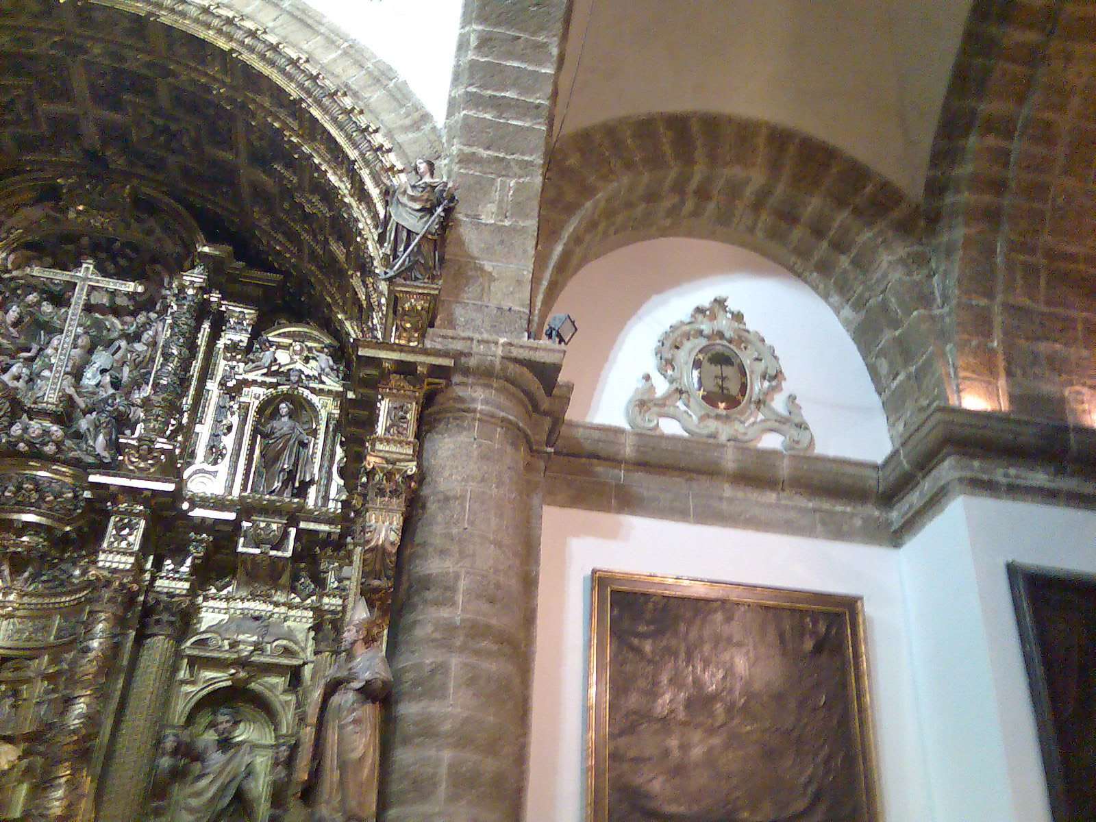 Escudo de Vizcaya en la Iglesia de la Santa Cruz (Catedral vieja) de Cádiz. Probablemente proviene de la desaparecida capilla de los vizcaínos.